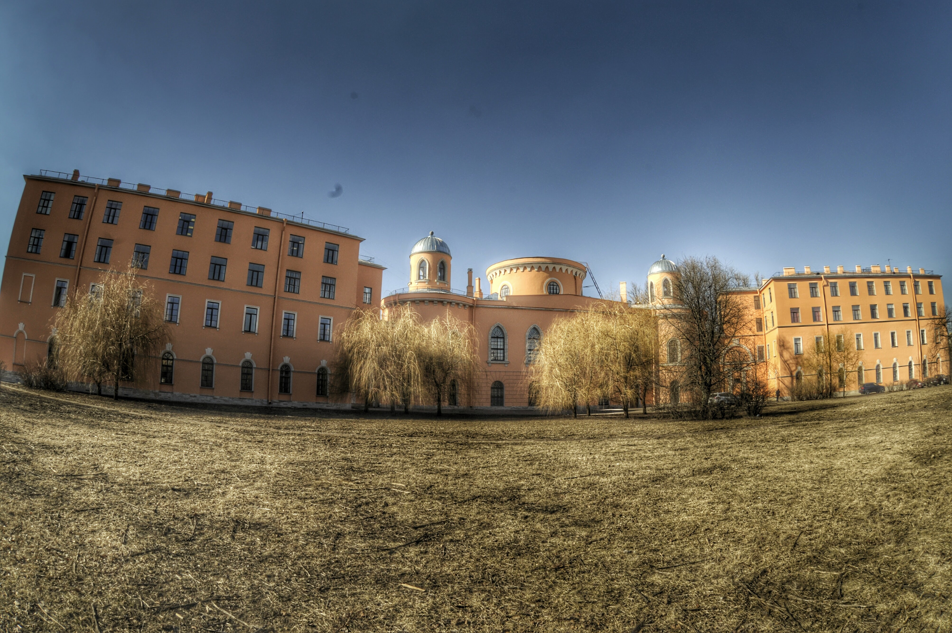 Чесменский дворец смешная детская какая_то архитектура, наивная